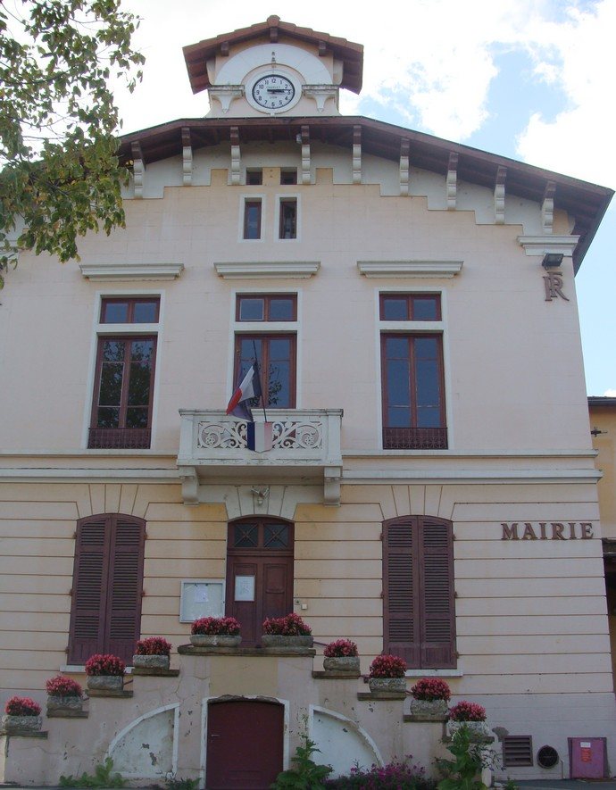 La mairie de Couzon-au-Mont-d'Or (Rhône).